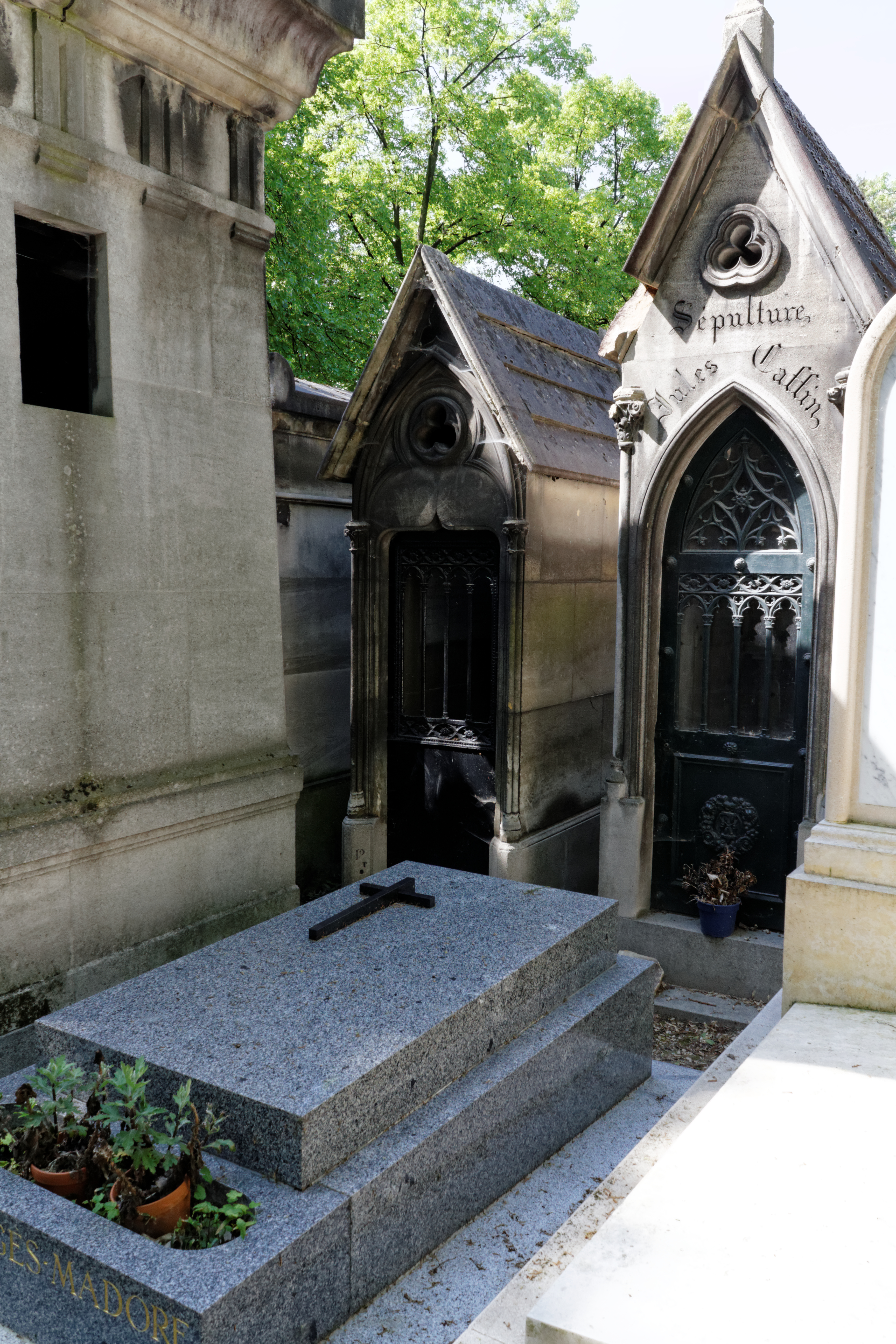 Sépulture du minéralogiste Paul Hautefeuille (1836-1902).